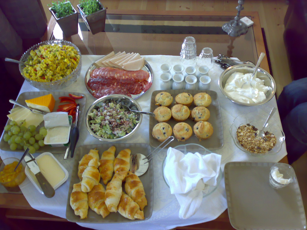 ארוחת בוהריים.